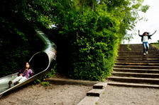 Urbanplanen